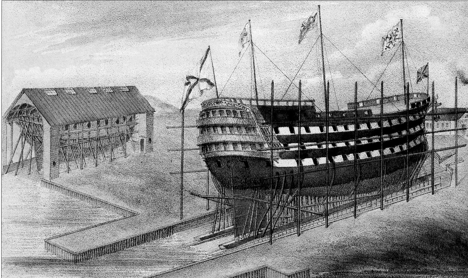 Линейный корабль «Двенадцать Апостолов» на стапеле адмиралтейства. Литография В.А.Прохорова